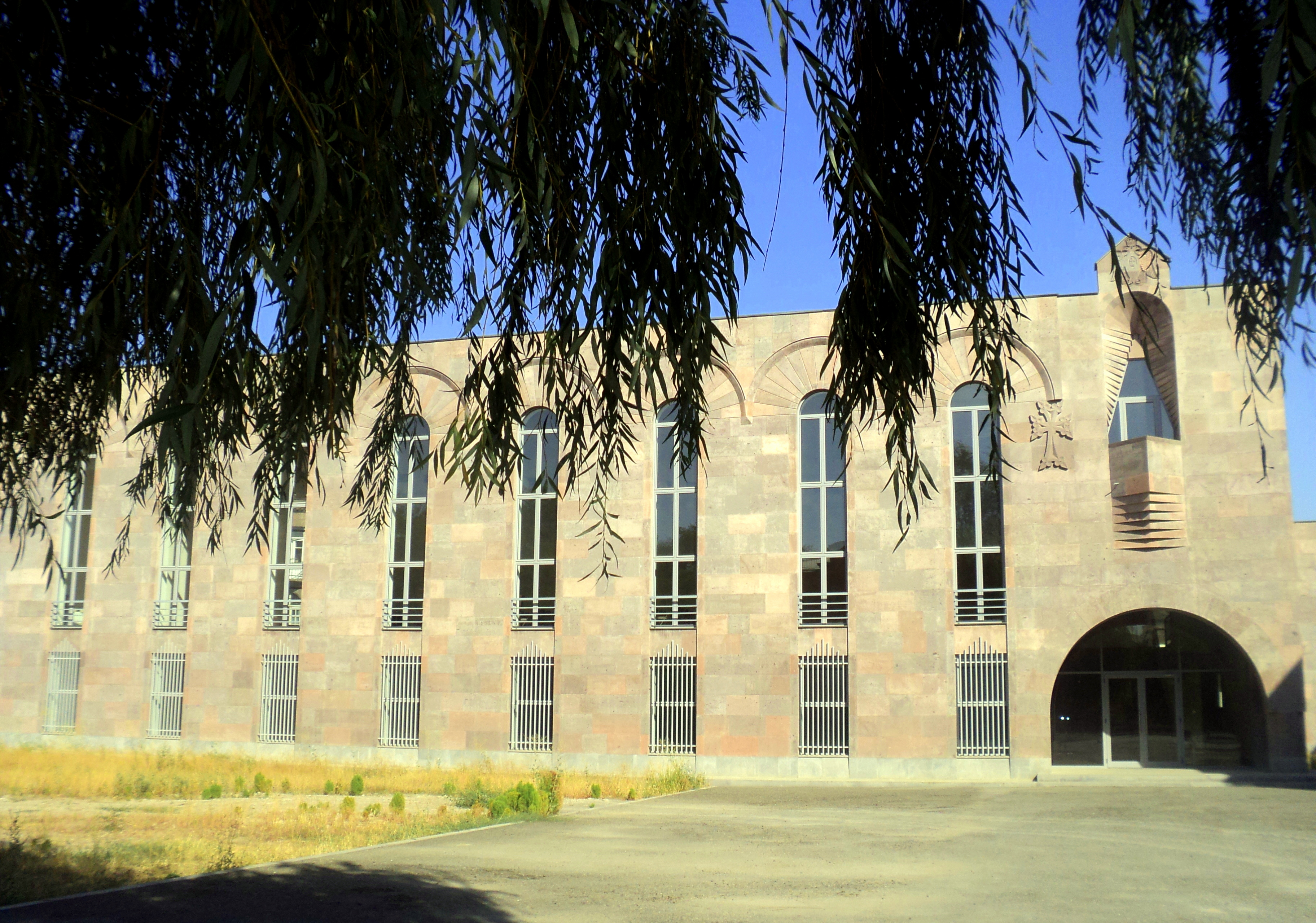 Գևորգյան հոգևոր ճեմարանի նոր մասնաշենք 2/14